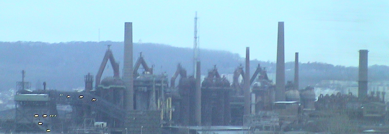 Weltkulturerbe Alte Völklinger Hütte, Ansicht von der Autobahn